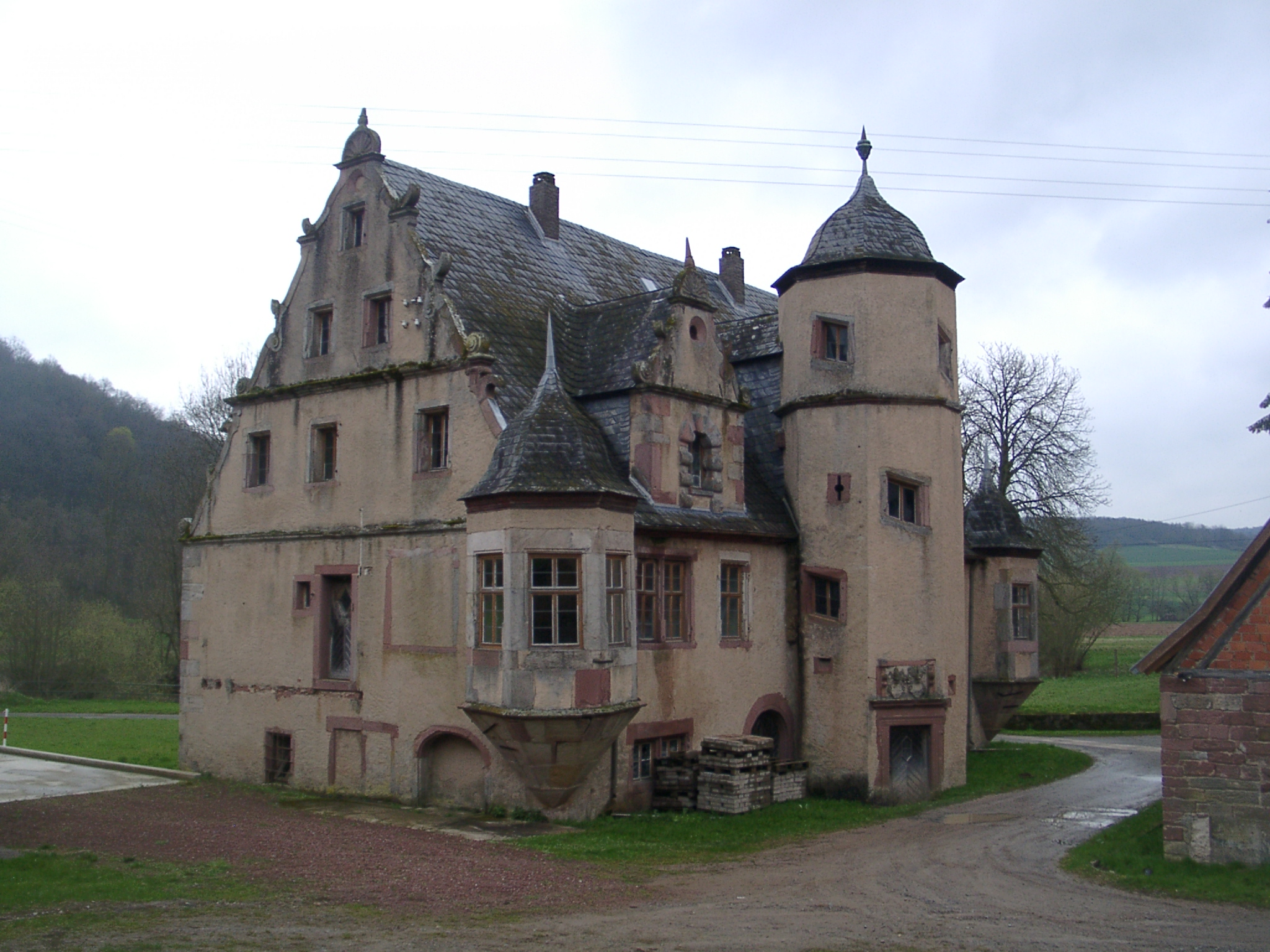 Eulschirbenmühle